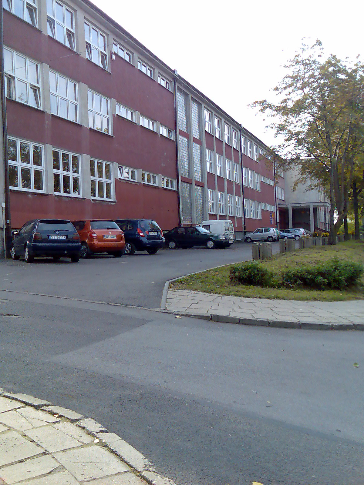 Zespół szkół numer 1 w Piekarach Śląskich